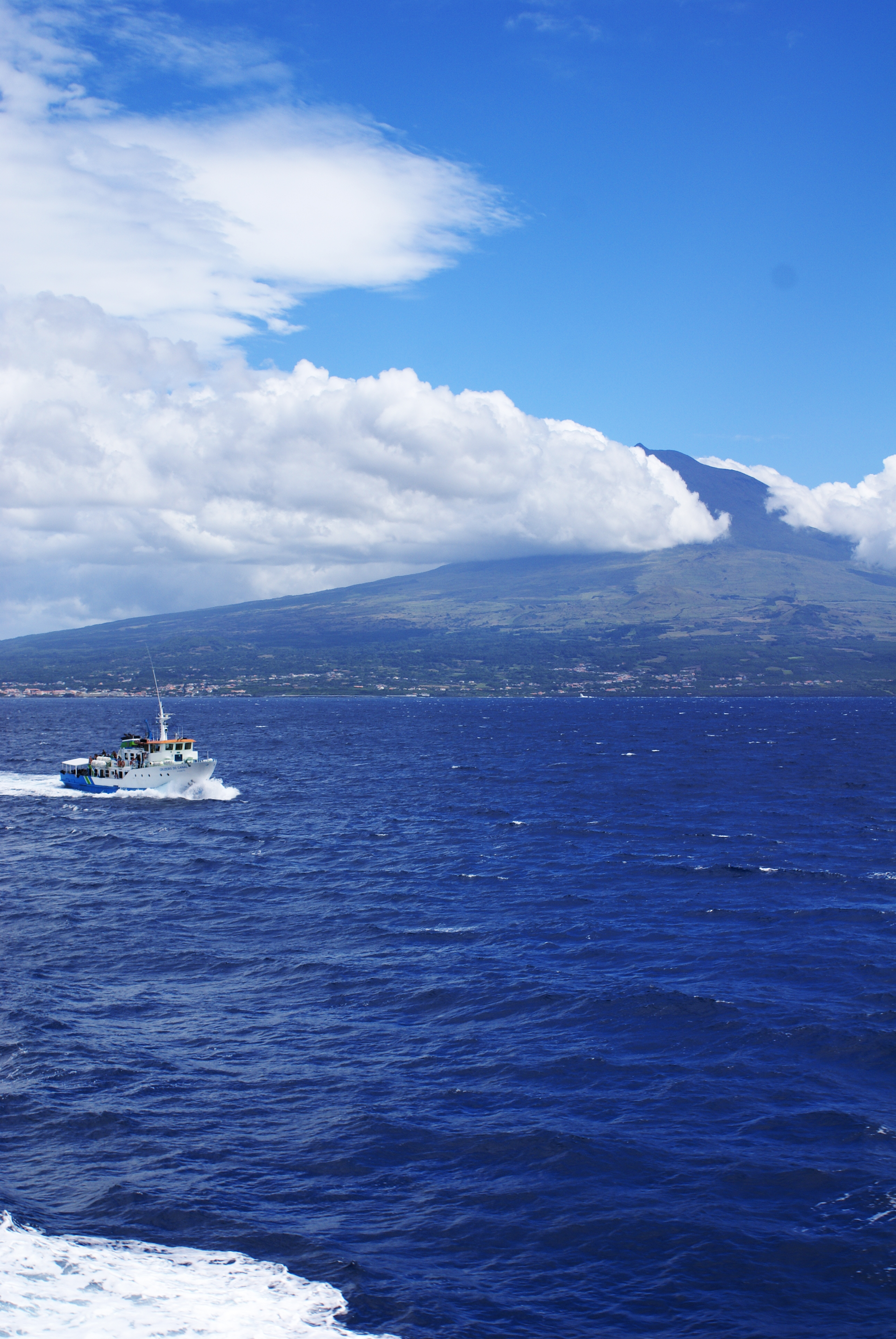 ilha do Pico vista ao largo da costa, Canal Pico São Jorge, Açores, Portugal